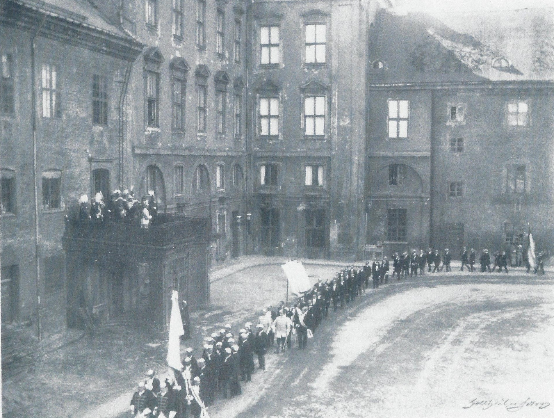 Signierte Fotografie vom 350-jährigen Jubiläum der Albertus-Universität: Im Hof des Königsberger Schlosses paradiert der Königsberger Senioren-Convent vor Friedrich Leopold von Preußen als Vertreter des Kaisers.